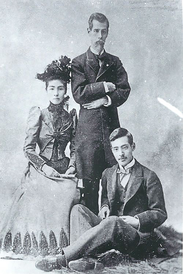 陸奥宗光。妻・亮子。長男・広吉（先妻との子）。